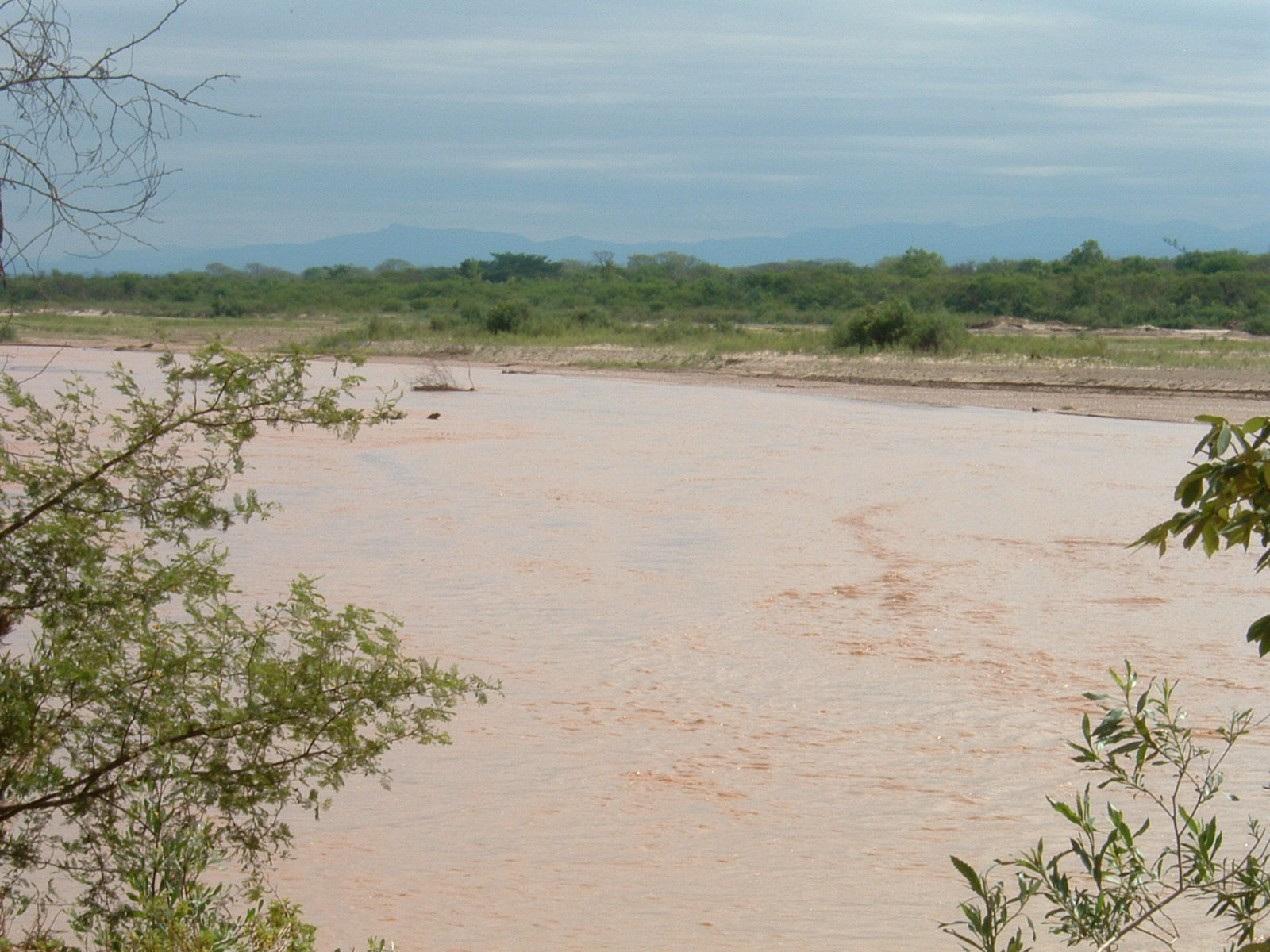 Foto scattata da me Foto del fiume Piraí, il fiume che passa per Santa Cruz de la Sierra, sullo sfondo le Ande